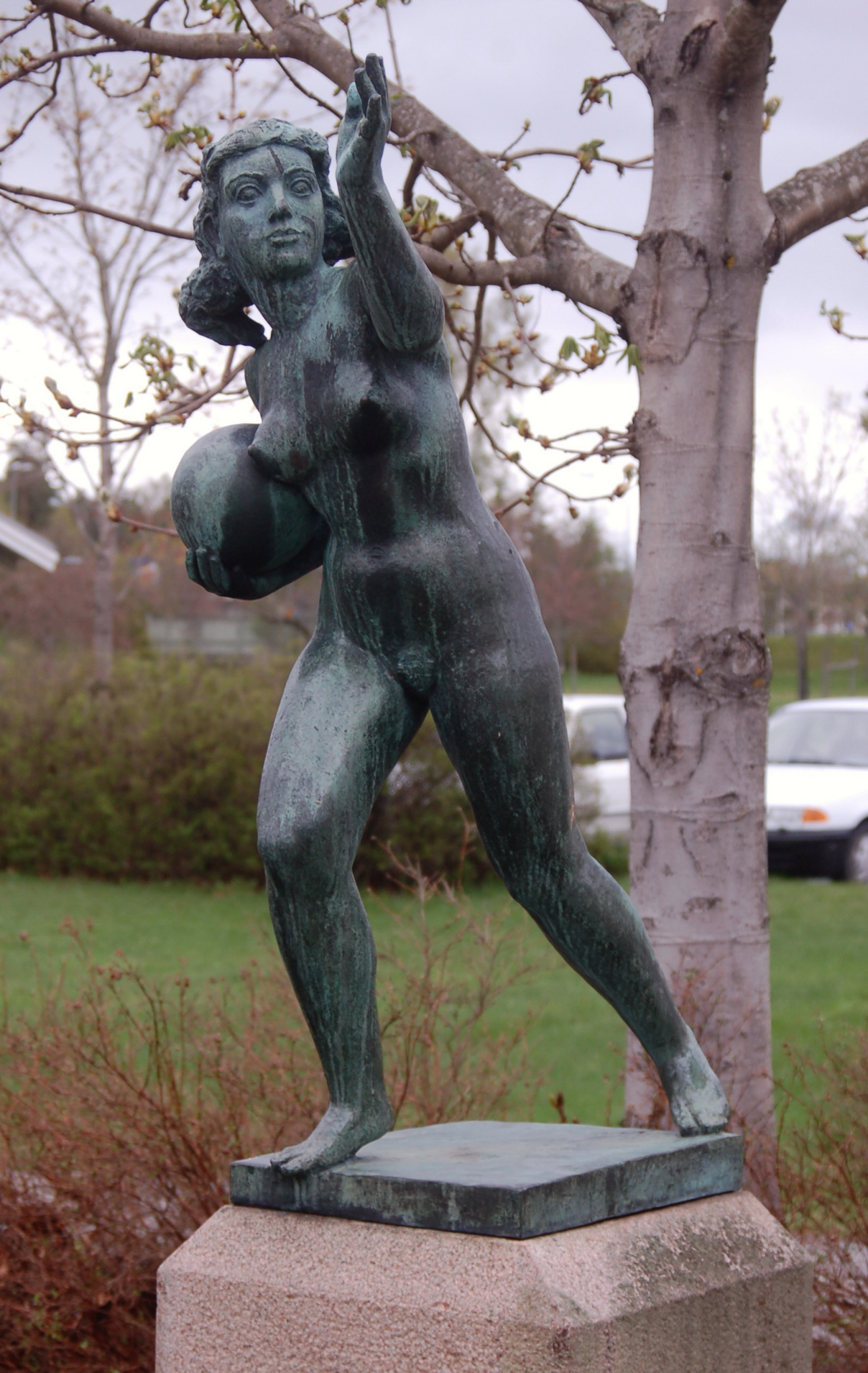 Eget foto av Axel Waleijs skulptur Naken flicka. Self-made.